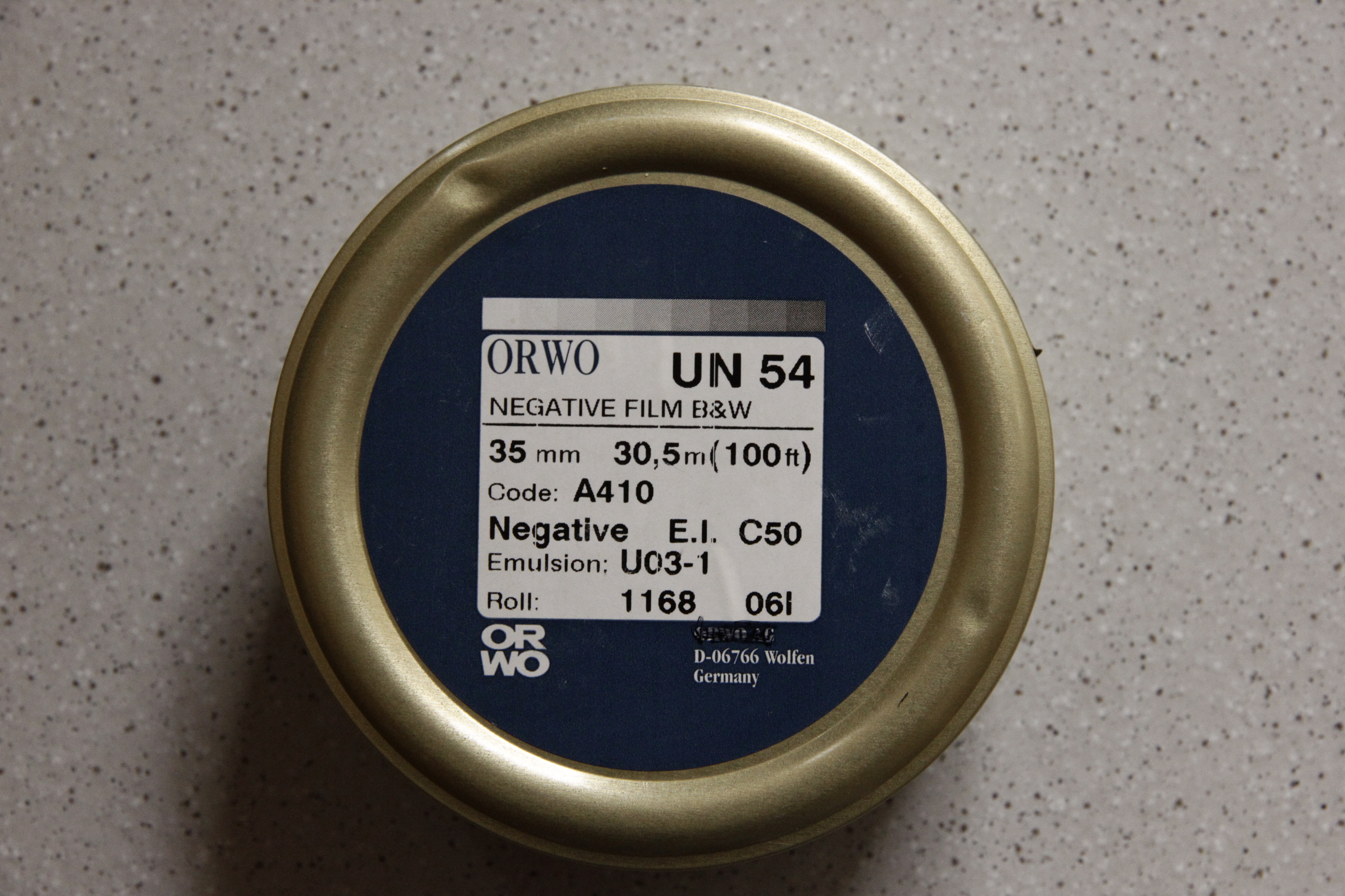 ORWO UN 54 - 30,5m (100ft) Film in Dose